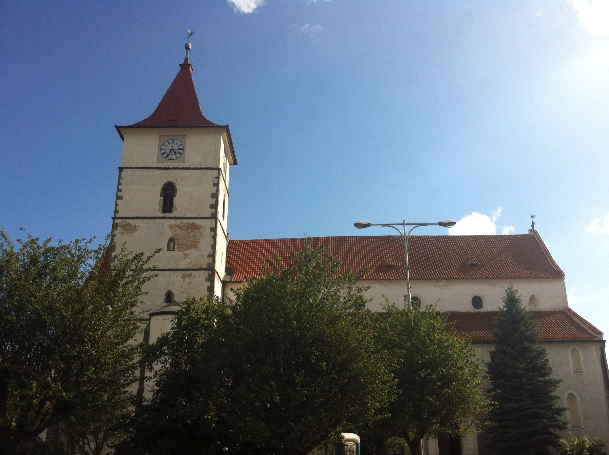 Kostel sv. Petra a Pavla (Horažďovice), Mírové nám., Horažďovice